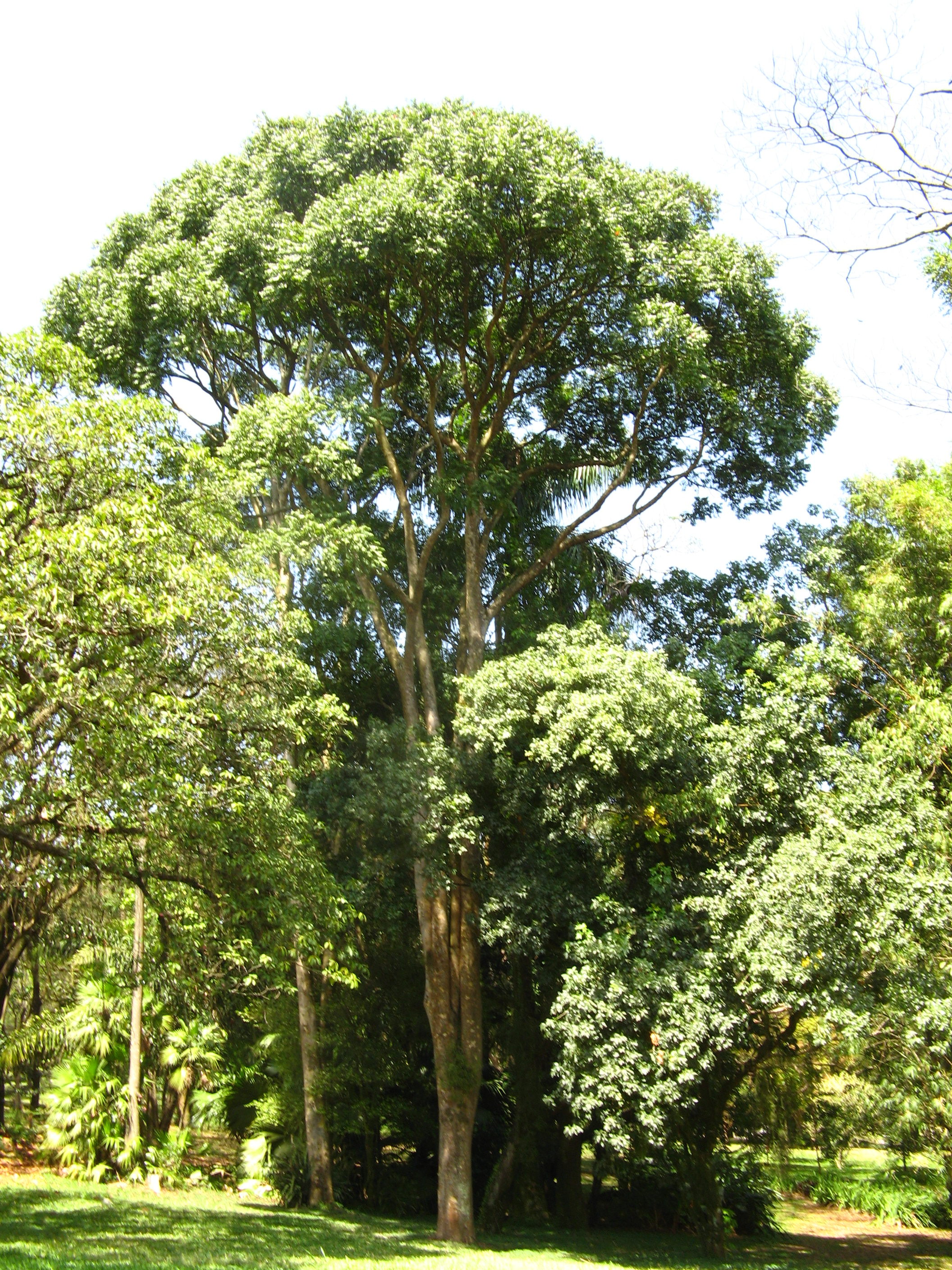 Jequitibá (Cariniana legalis), Arboretum Jardim botanico de São Paulo, Brazil